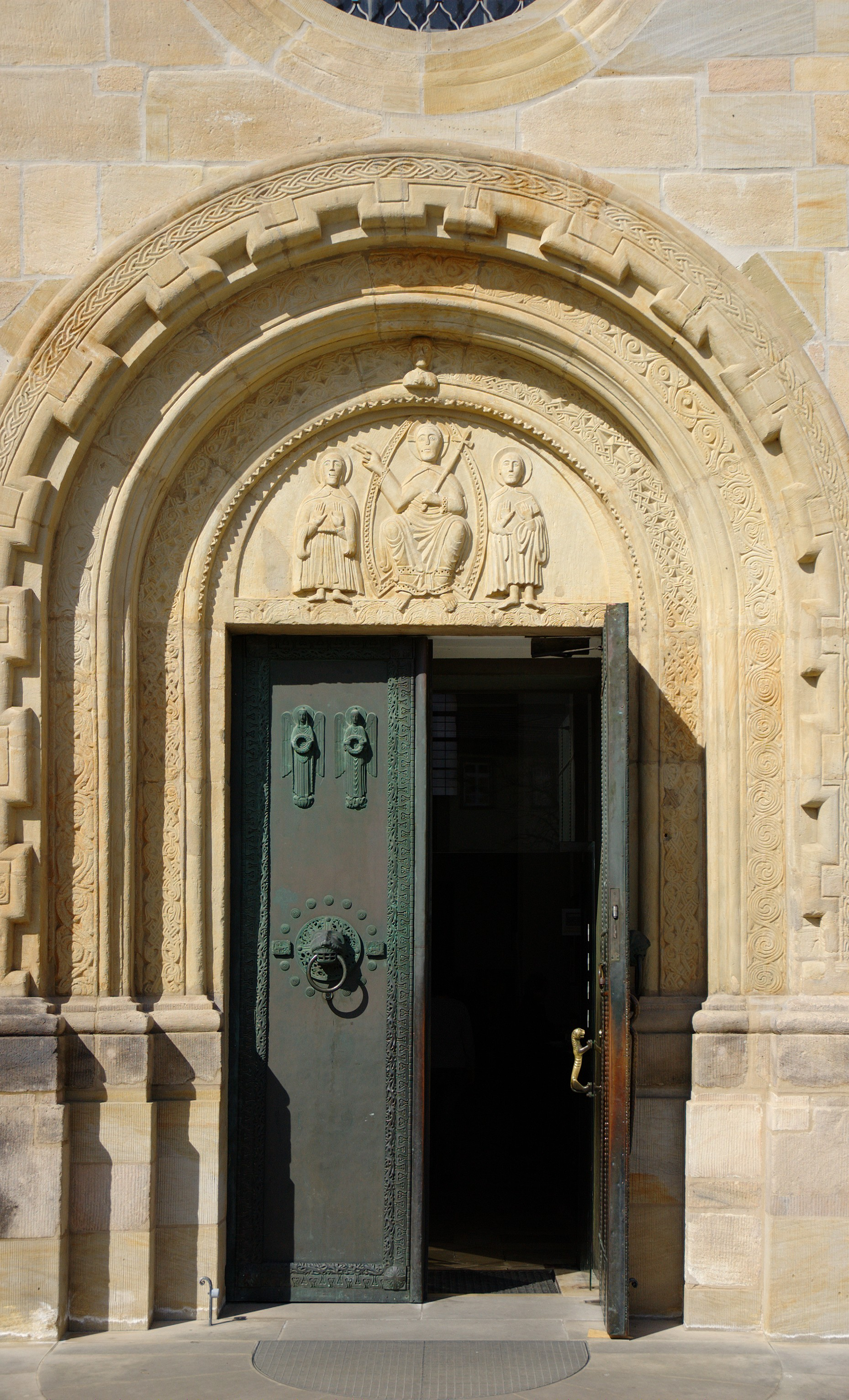 St. Vitus Ellwangen, spätromanisches Hauptportal (um 1225), Tympanon: Der erhöhte Christus mit Maria und Johannes; Bronzetüren von August Koch (1910)